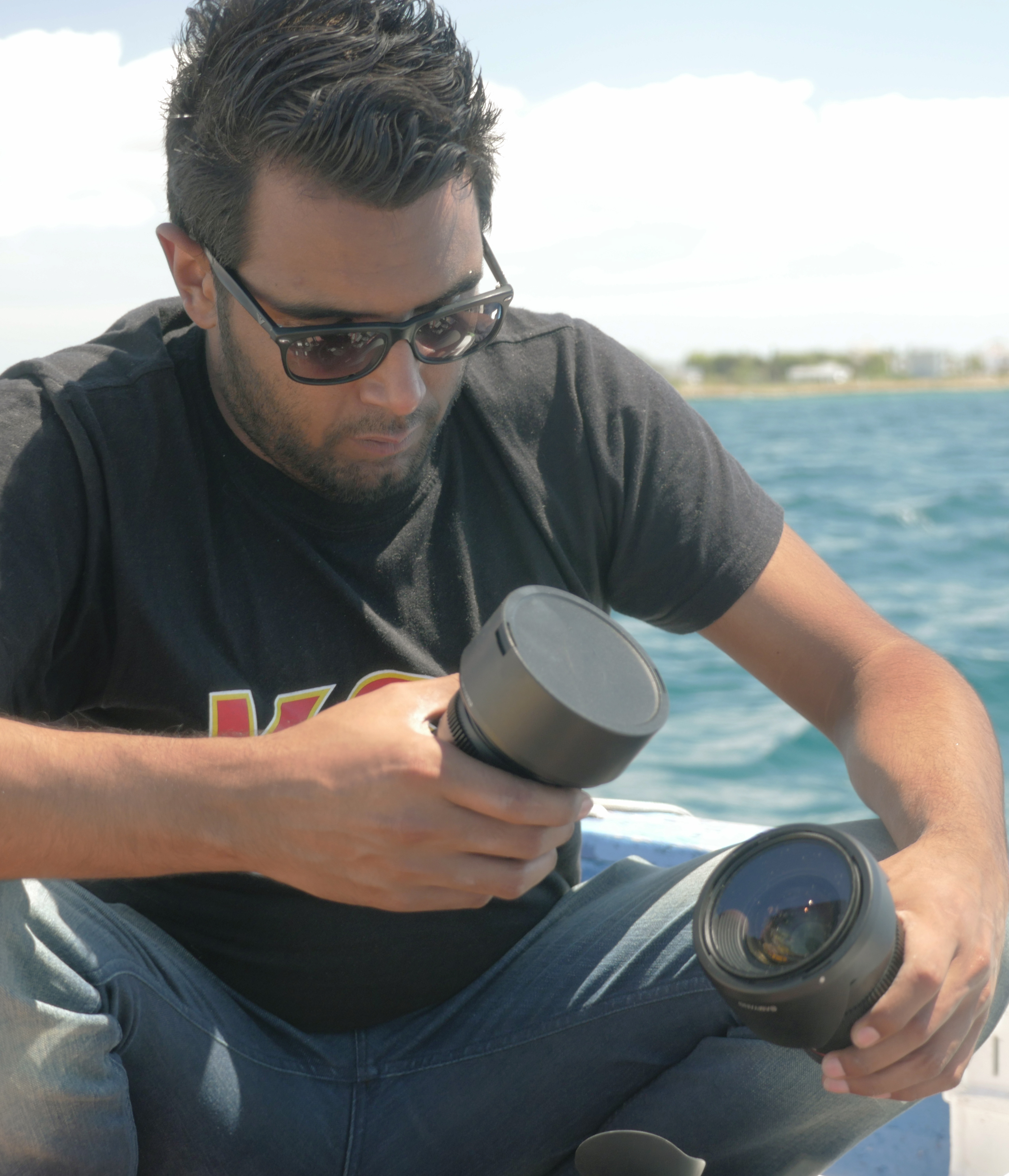 Foto scattata durante le riprese in Italia 2016